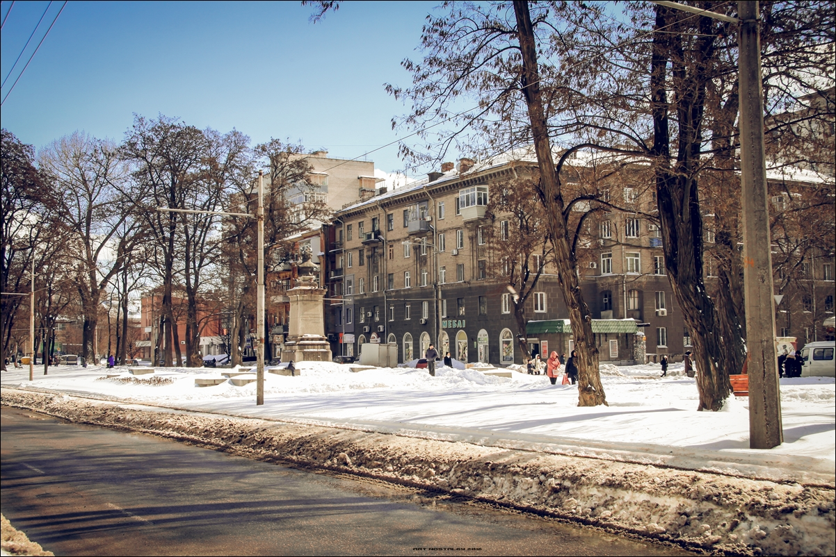 проспект Пушкіна